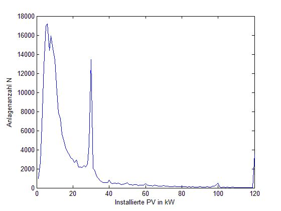 Selbst erstelltes Histogramm der PV-Anlagen nach Leistung bis 100 kWp, aus offiziellen Daten (Jan 2009 - Mai 2010) der BNetzA erstellt. Datenquelle